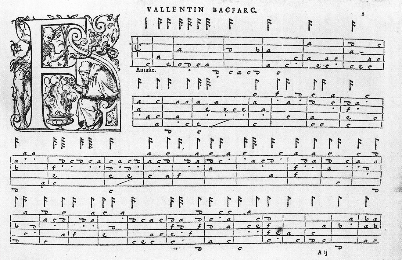 przykład tabulatury lutniowej francuskiej